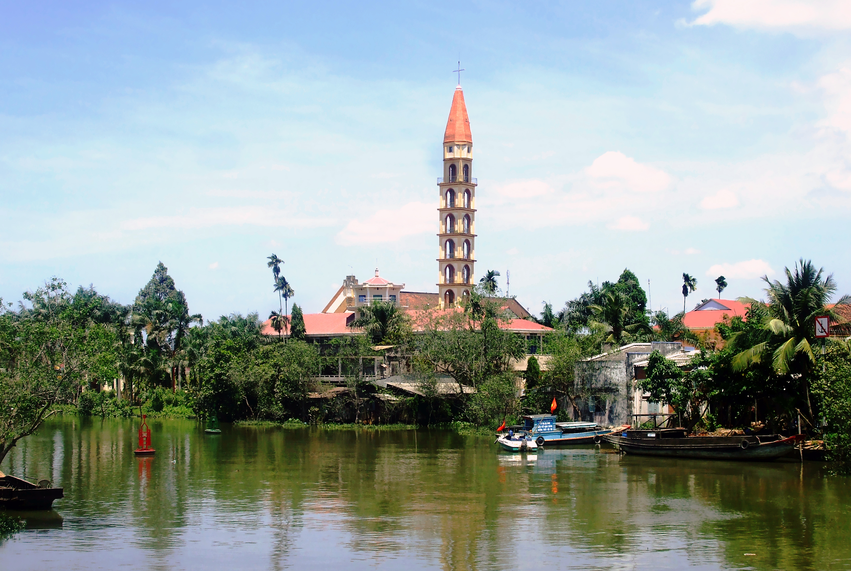 Nhà thờ họ đạo Cái Mơn ở xã Vĩnh Thành, huyện Chợ Lách, Bến Tr, Việt Nam.